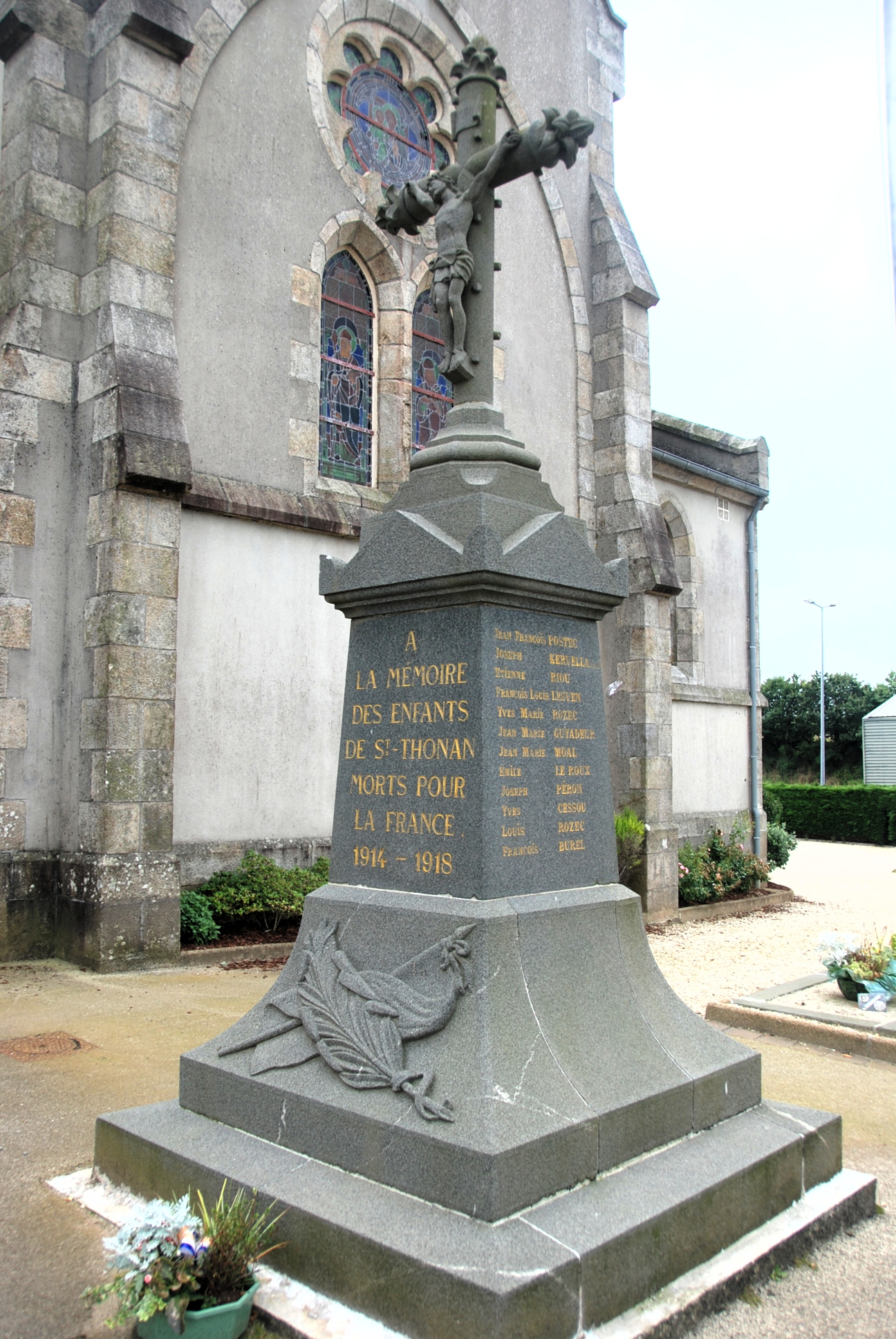 Monument aux Morts - St Thonan-29